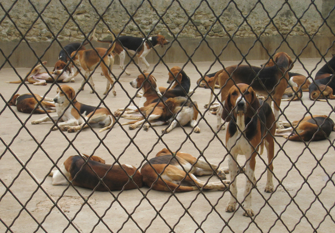 Schloss Cheverny, Jagdhunde im Zwinger